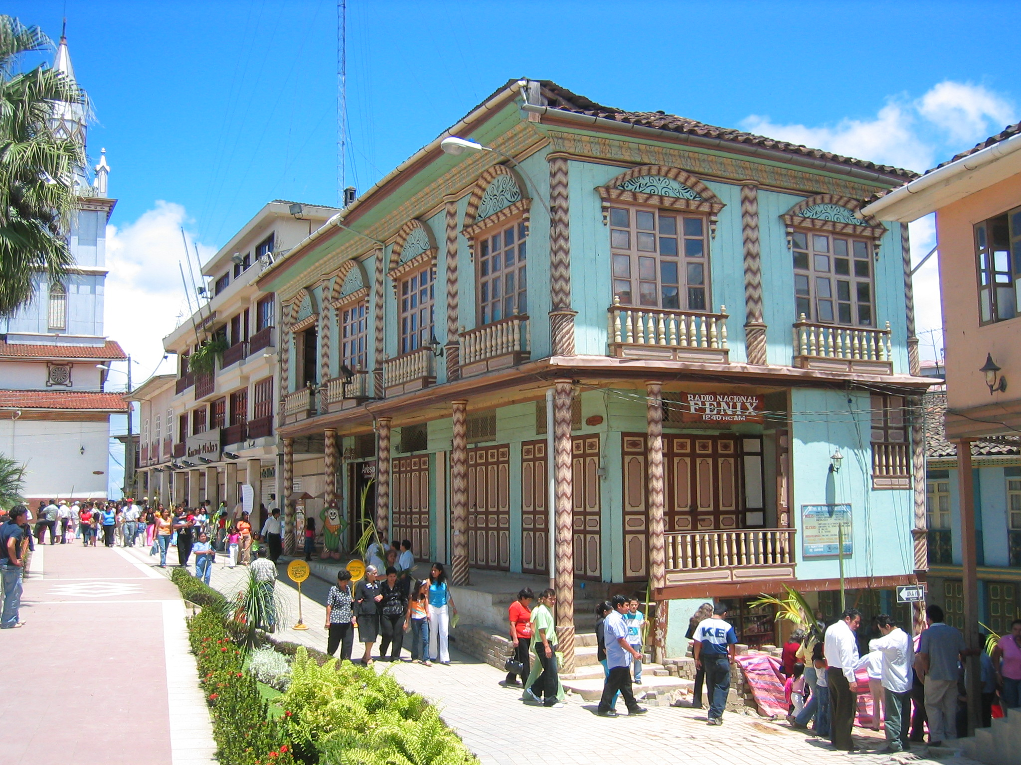 Casa del centro histórico de Zaruma